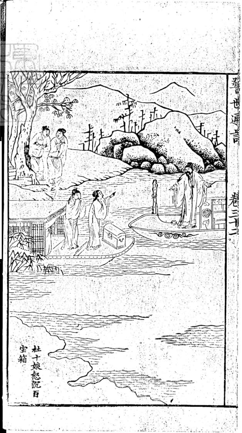 中文（中国大陆）: 明天啟四年序金陵兼善堂刊本（東洋文化研究所藏本）《杜十娘怒沉百寶箱》插圖